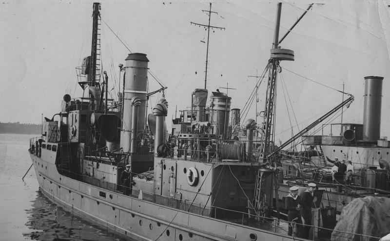 Trałowiec ORP Jaskółka w porcie w Gdyni